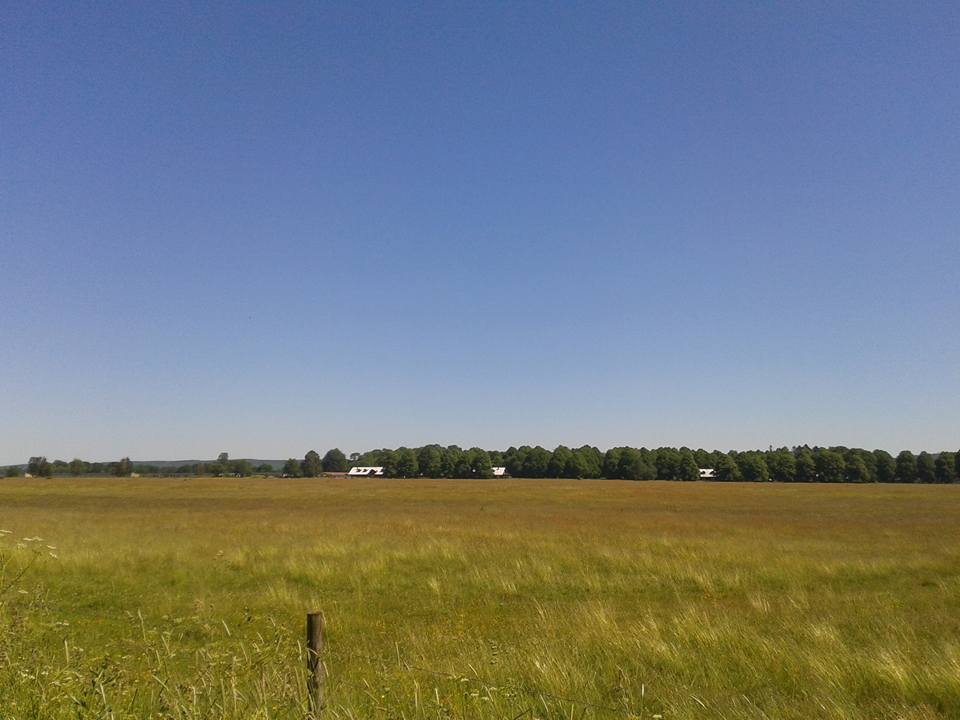 Axevalla hed är ett öppet hedlandskap mellan Husgärdessjön och samhället Axvall i Skärvs socken i Skara kommun, Västergötland. Heden användes som tillfällig övningsplats för Skaraborgs regemente första gången 1696 och från 1725 var den regementets permanenta övningsplats. År 1913 flyttade Skaraborgarna in till Skövde. Även Västgöta regemente övade på heden tills de 1916 flyttade till Vänersborg.